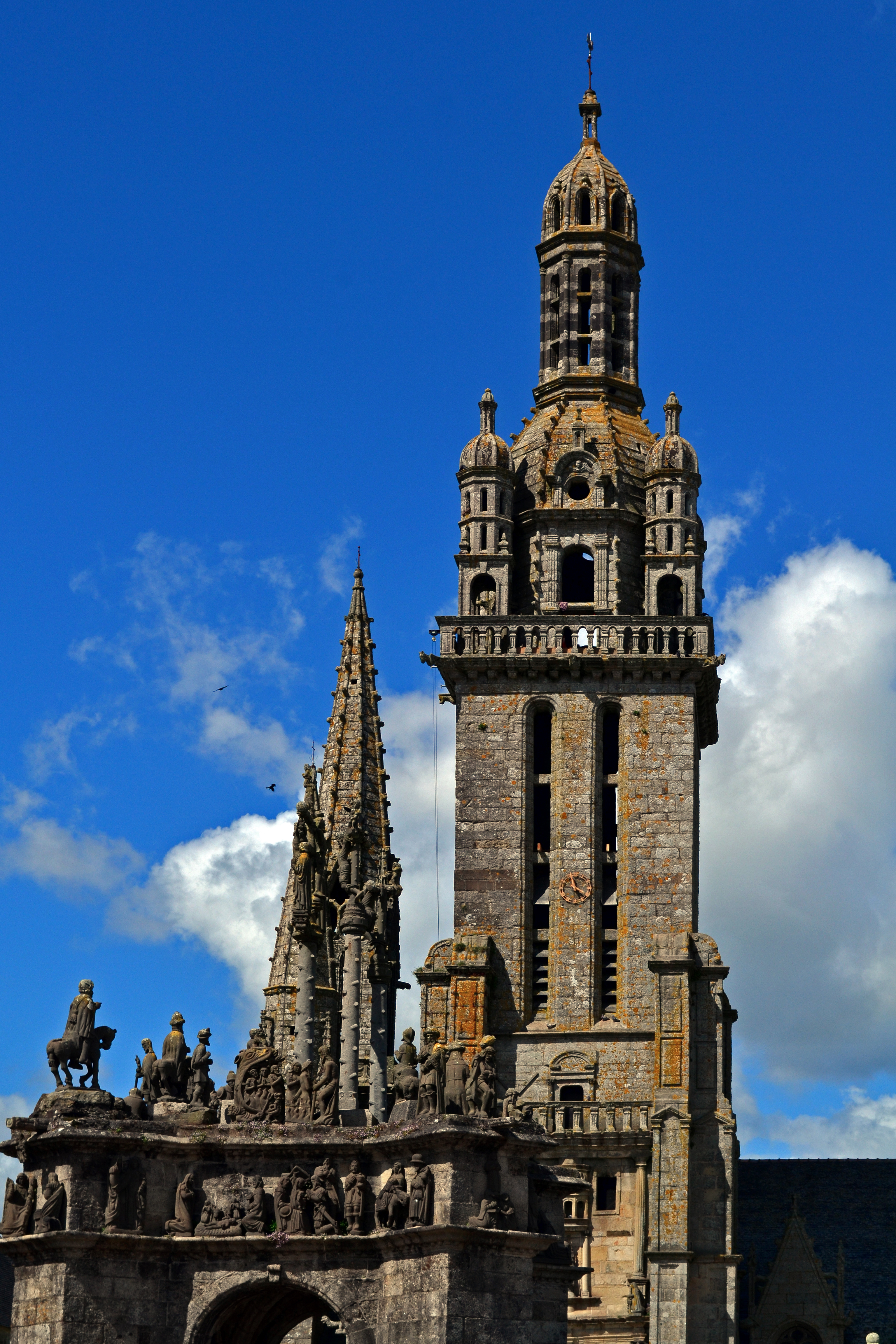 Enclos paroissial de Pleyben (Finistère)